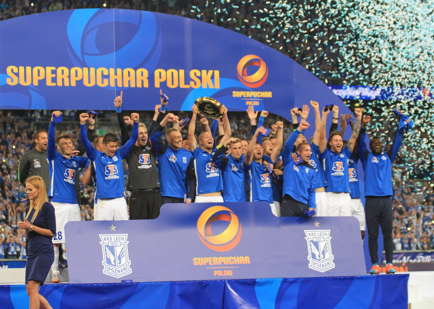 Mecz o Superpuchar Polski w piłce nożnej: Lech Poznań - Legia Warszawa (3:1), INEA Stadion, Poznań